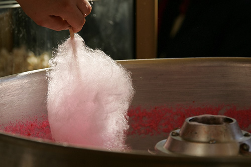 Basler Herbstmesse 2005: Gasser's Zuckerwatte